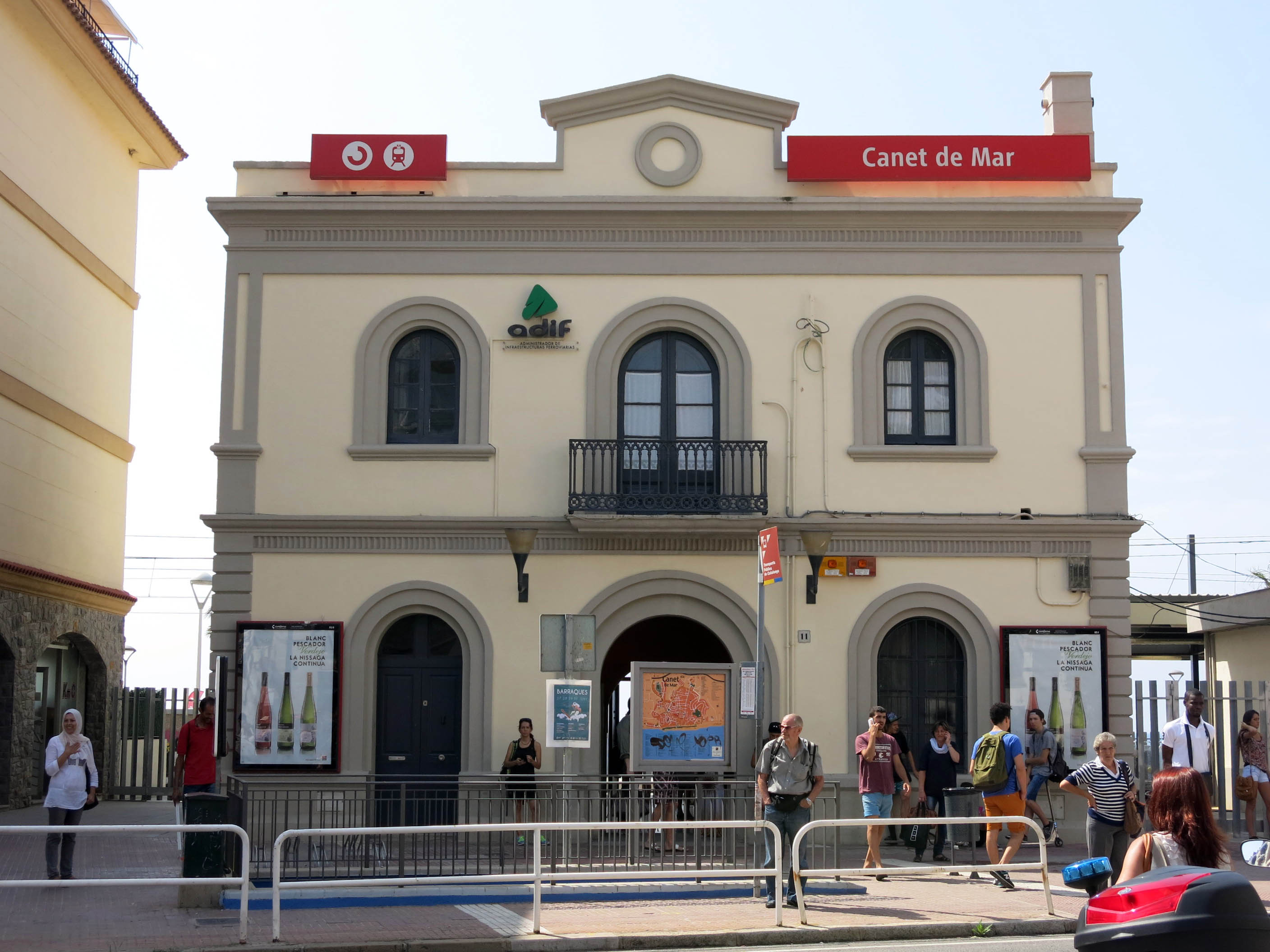 Estació de ferrocarril de Canet de Mar.